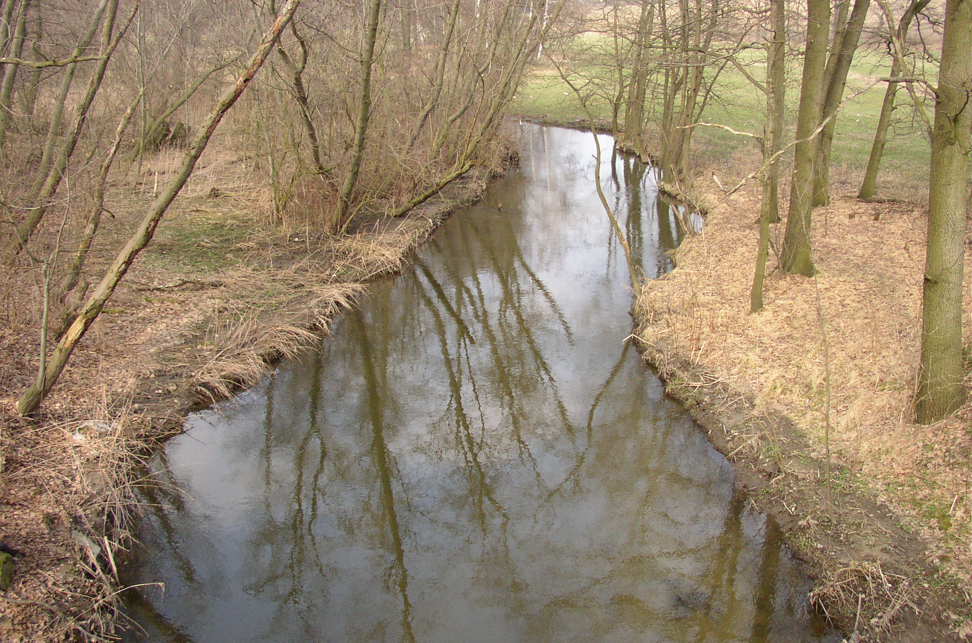 Natürlicher Lauf der Wesenitz zwischen Kleindrebnitz und Goldbach auf dem Gelände des ehemaligen sog. Goldbacher Teiches. Der Teich wurde zu Beginn des 19. Jhd. wegen fehlender Produktivität trockengelegt. Das Gelände wird inzwischen von der Eisenbahnlinie Dresden - Bischofswerda durchschnitten.